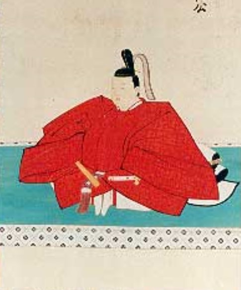 溝口直治の肖像。